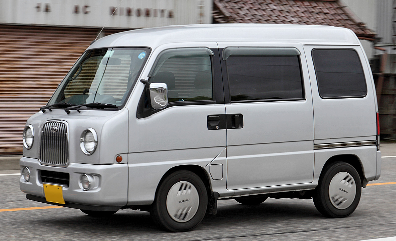 Subaru Sambar Dias Wagon Classic ('99 10 - '02 09)